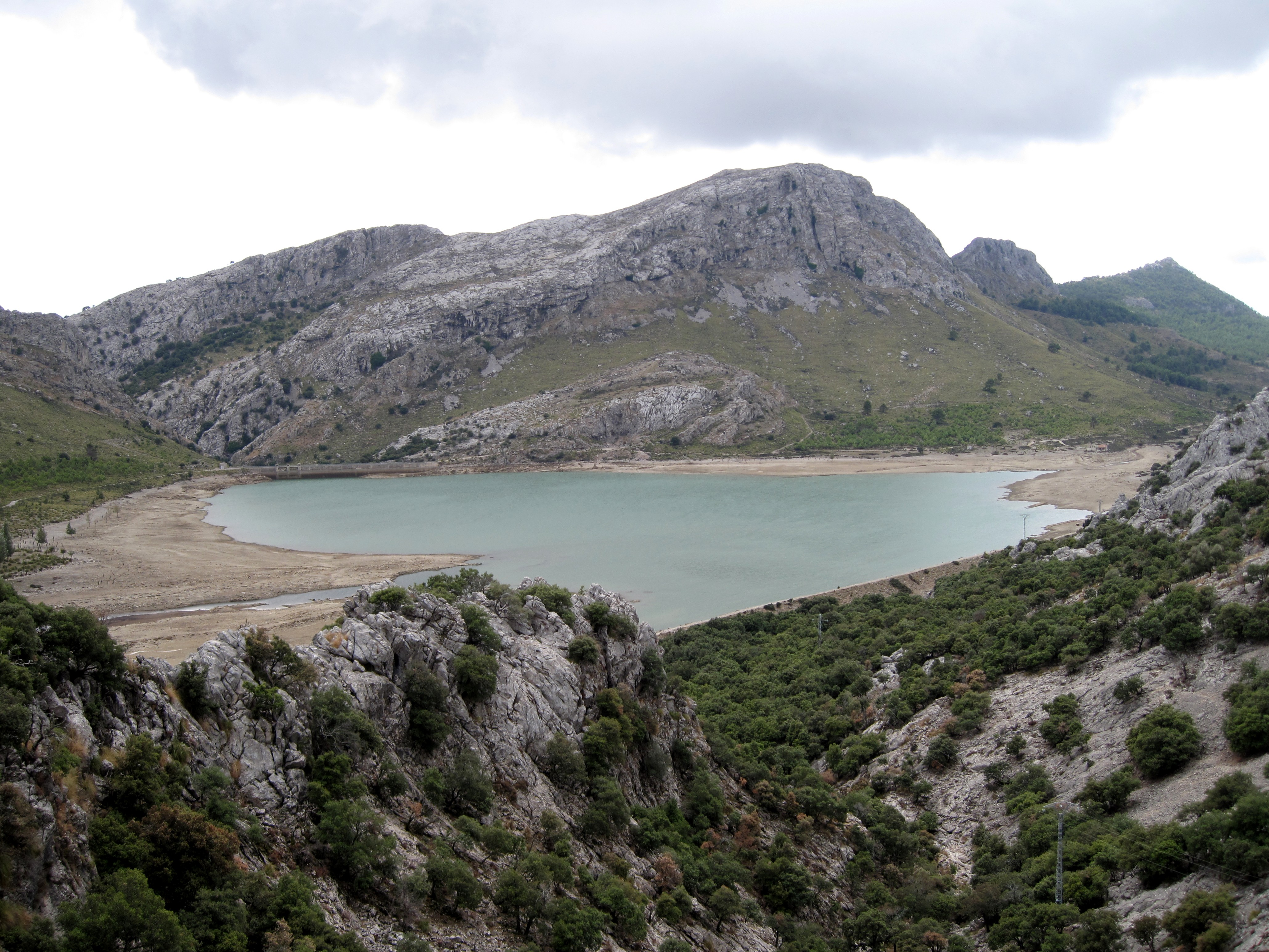 Stausee von Cúber, Serra de Tramuntana, Gemeinde Escorca, Mallorca, Spanien